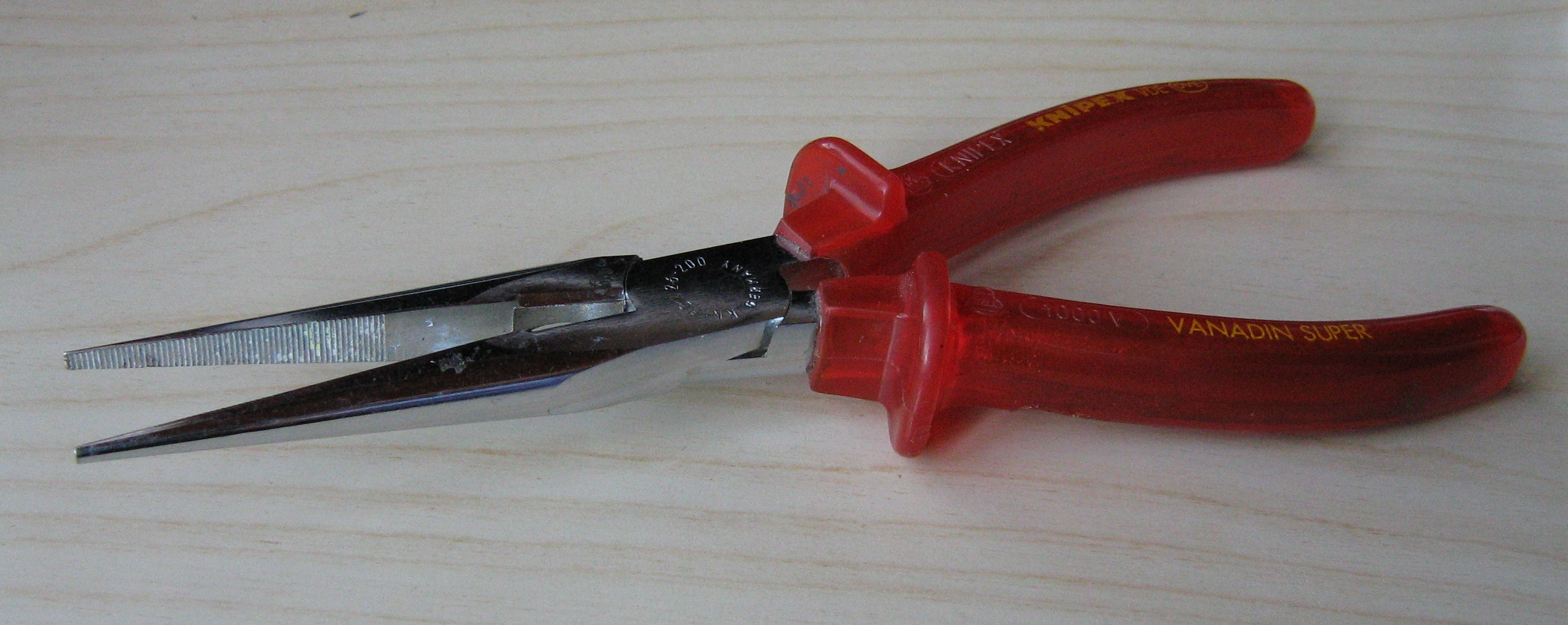 Spitzzange